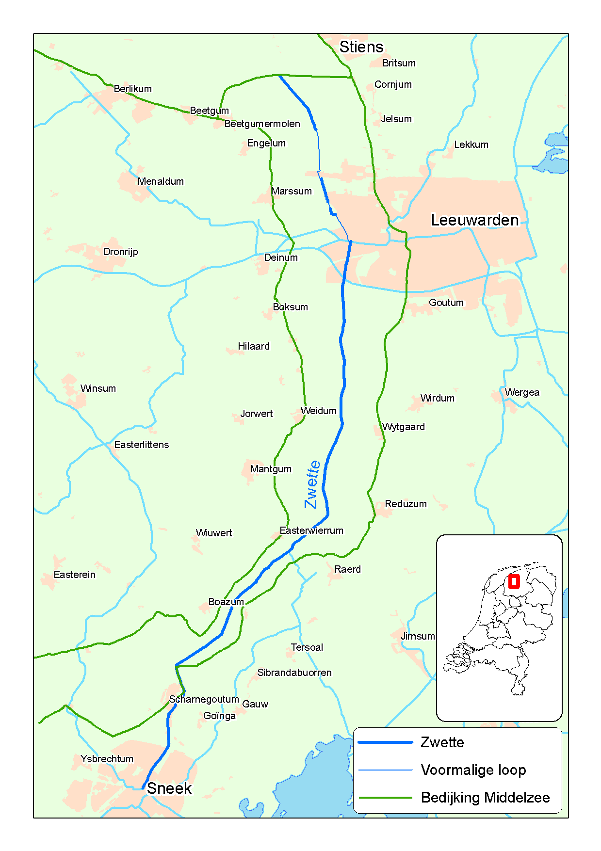 Kaartje van het stroomgebied van de Zwette. Gemaakt van eigen bestanden.